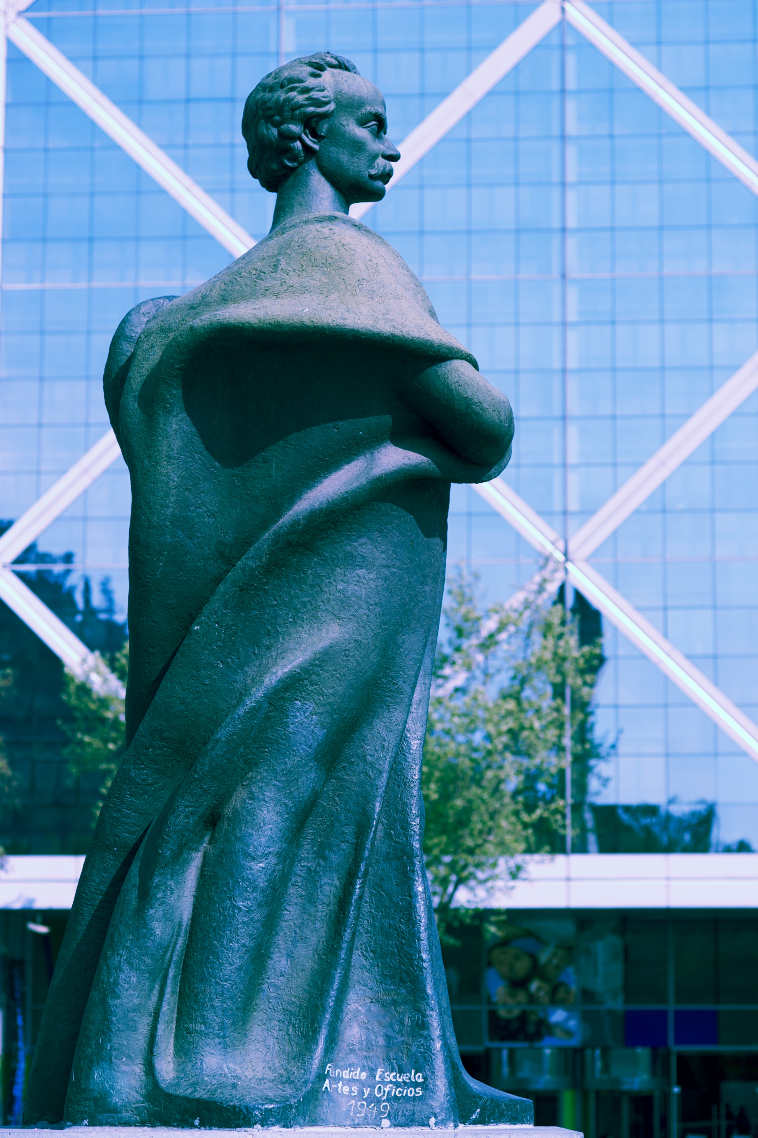 Estatua del Presidente de Chile José Manuel Balmaceda.